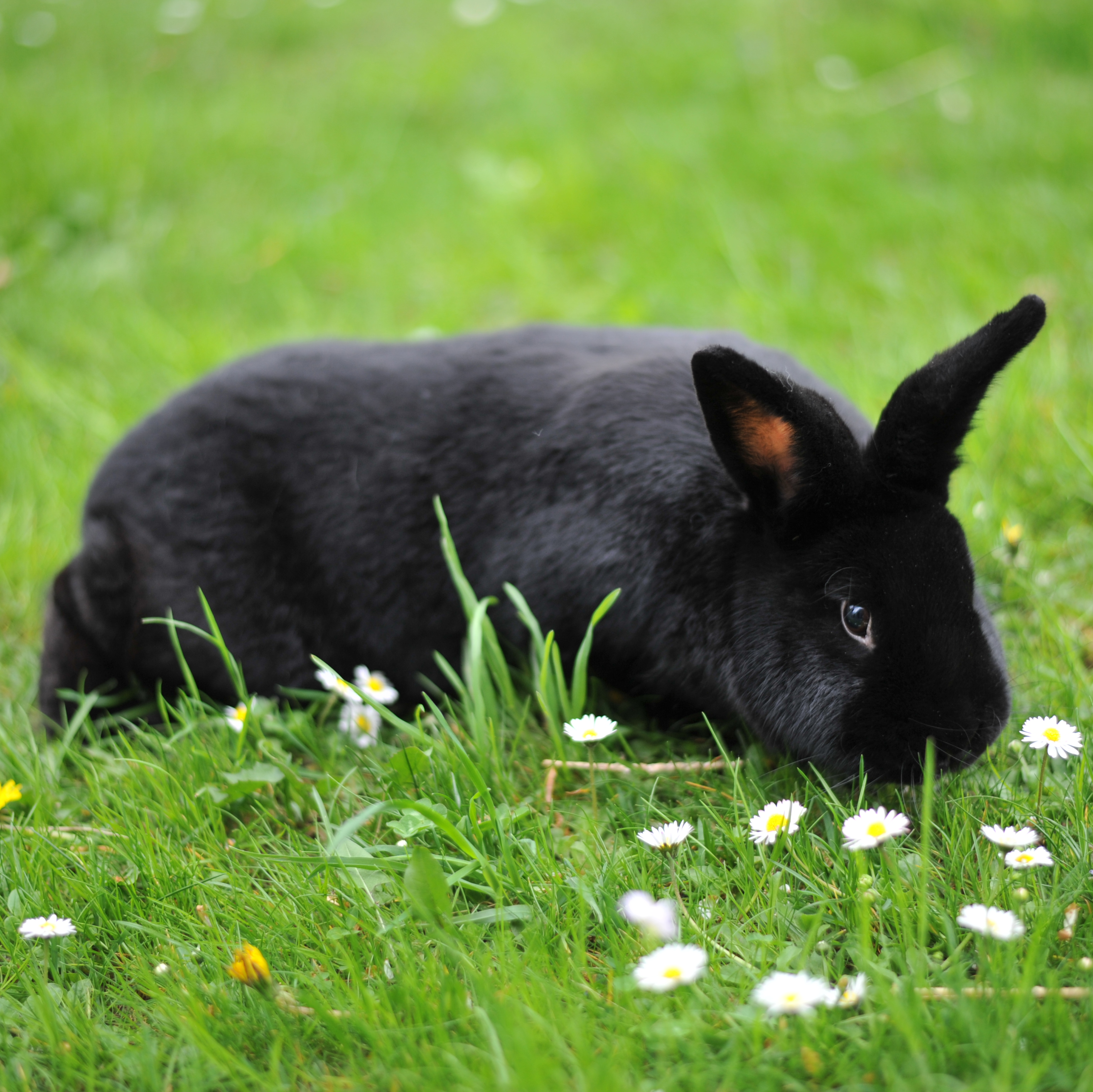 Rassekaninchen Alaska schwarz